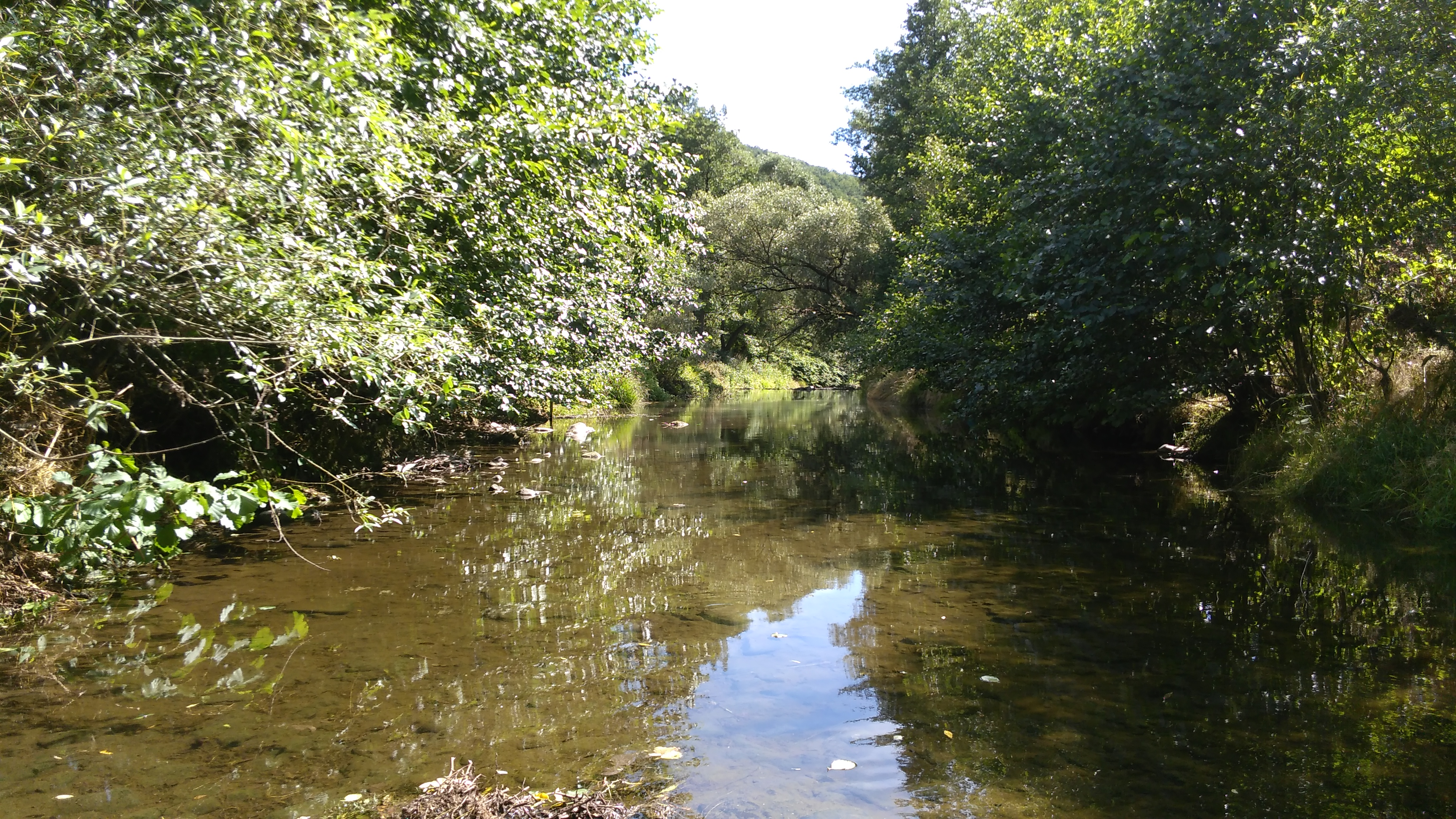 Potok Štiavnica v obci Domaníky (Slovensko).